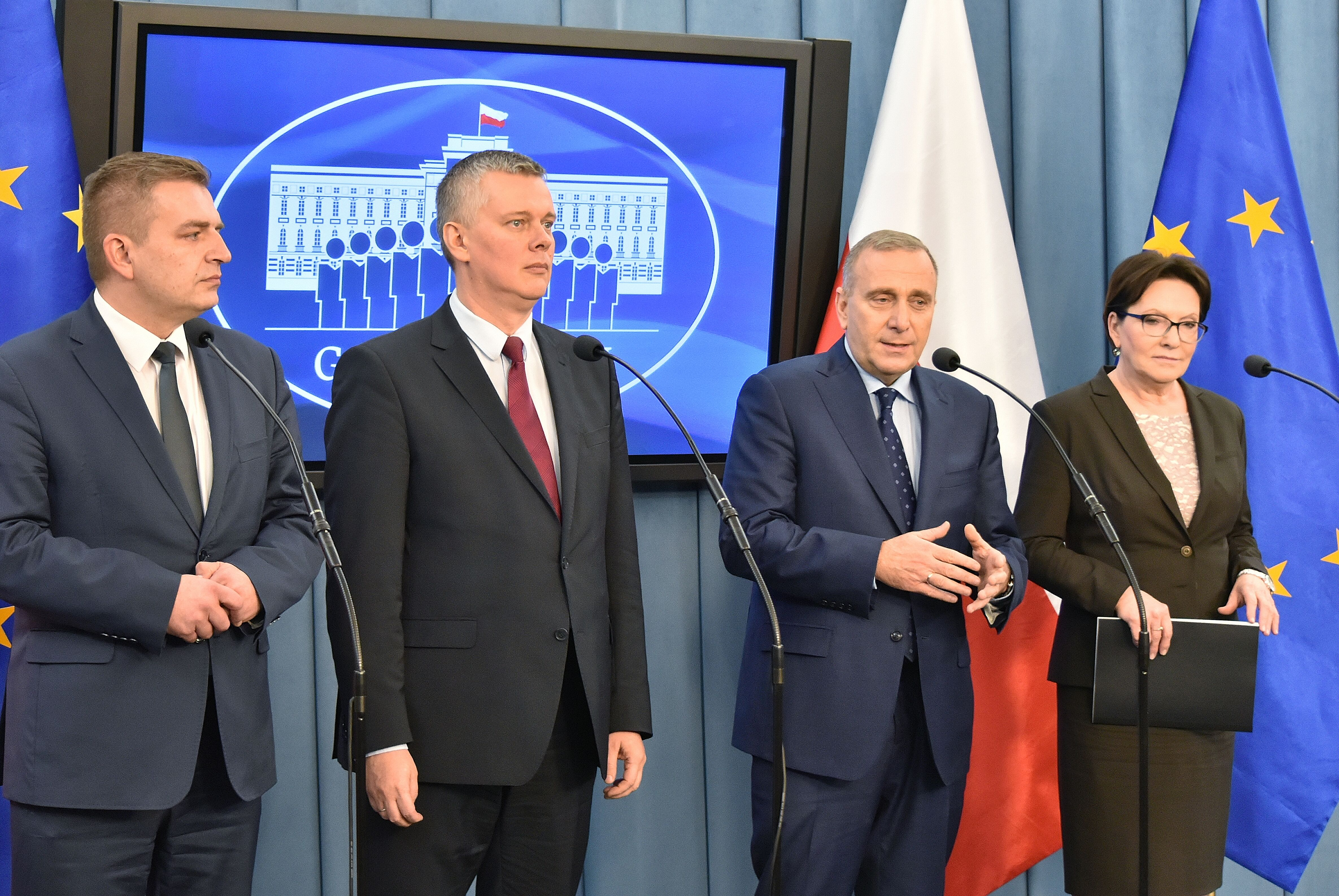 Konferencja prasowa po posiedzeniu Gabinetu Cieni Platformy Obywatelskiej w Sejmie. Stoją od lewej: Bartosz Arłukowicz, Tomasz Siemoniak, Grzegorz Schetyna i Ewa Kopacz